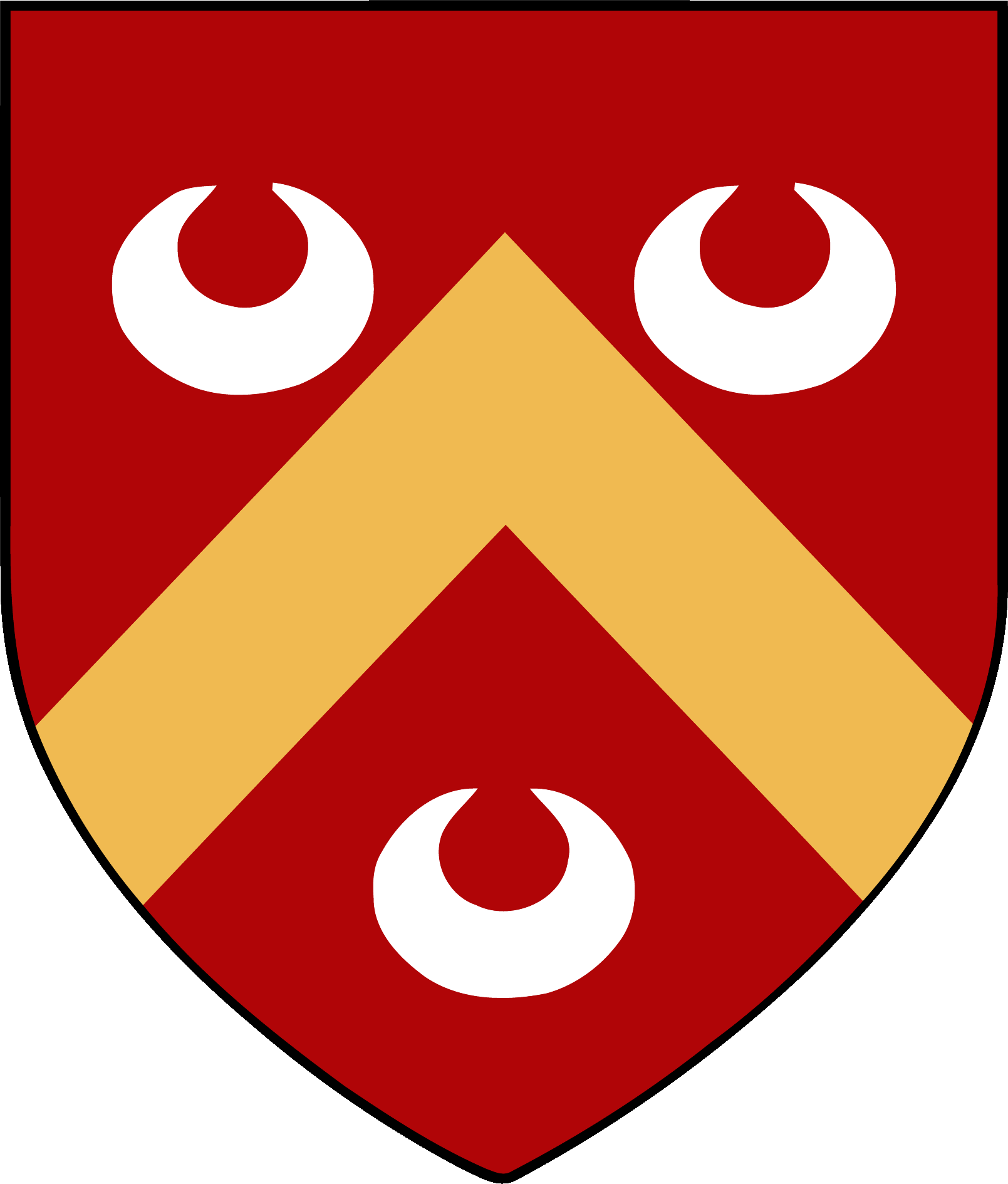 Grb Vojinvića, štit.